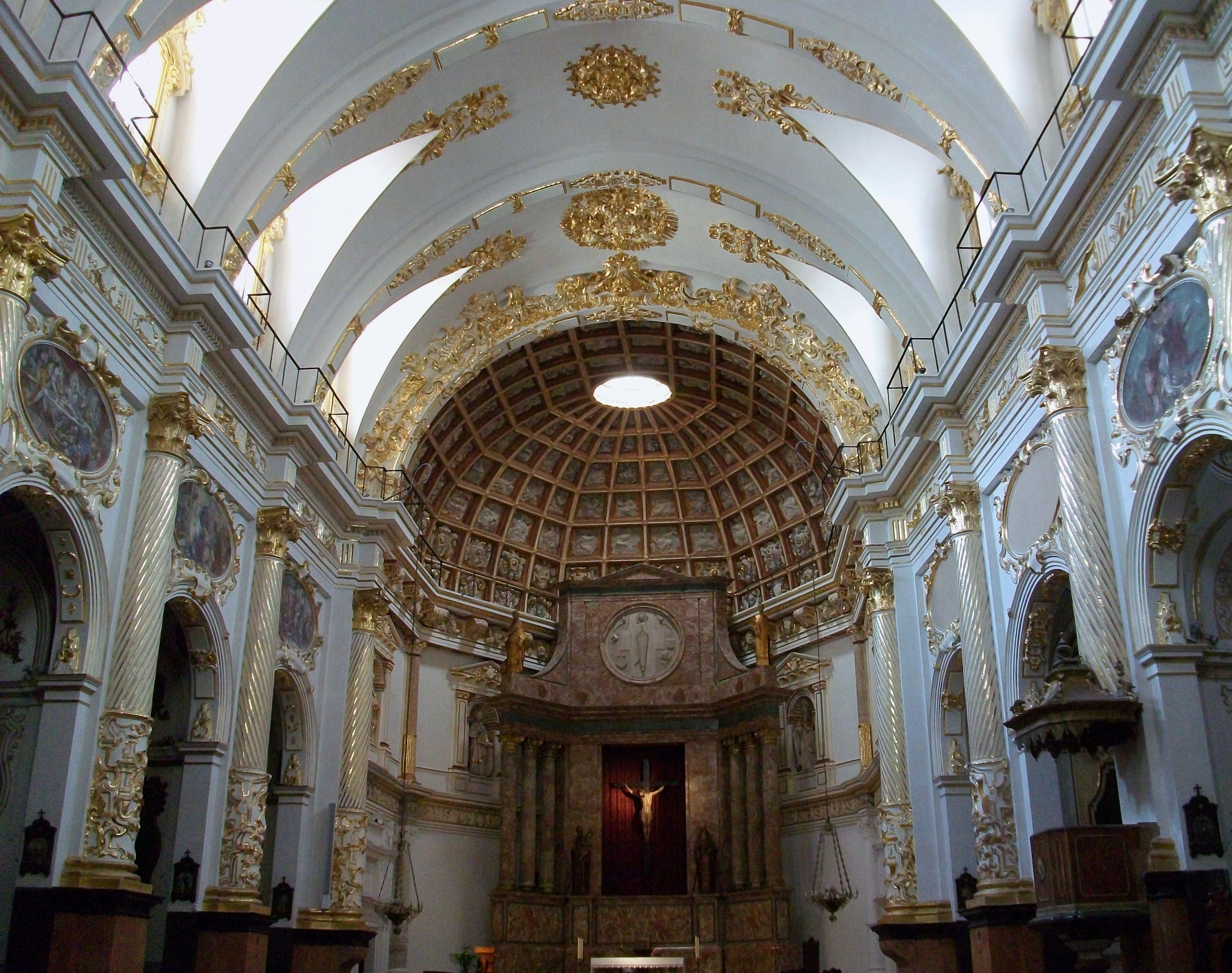 Interior de l'església de sant Martí - València.